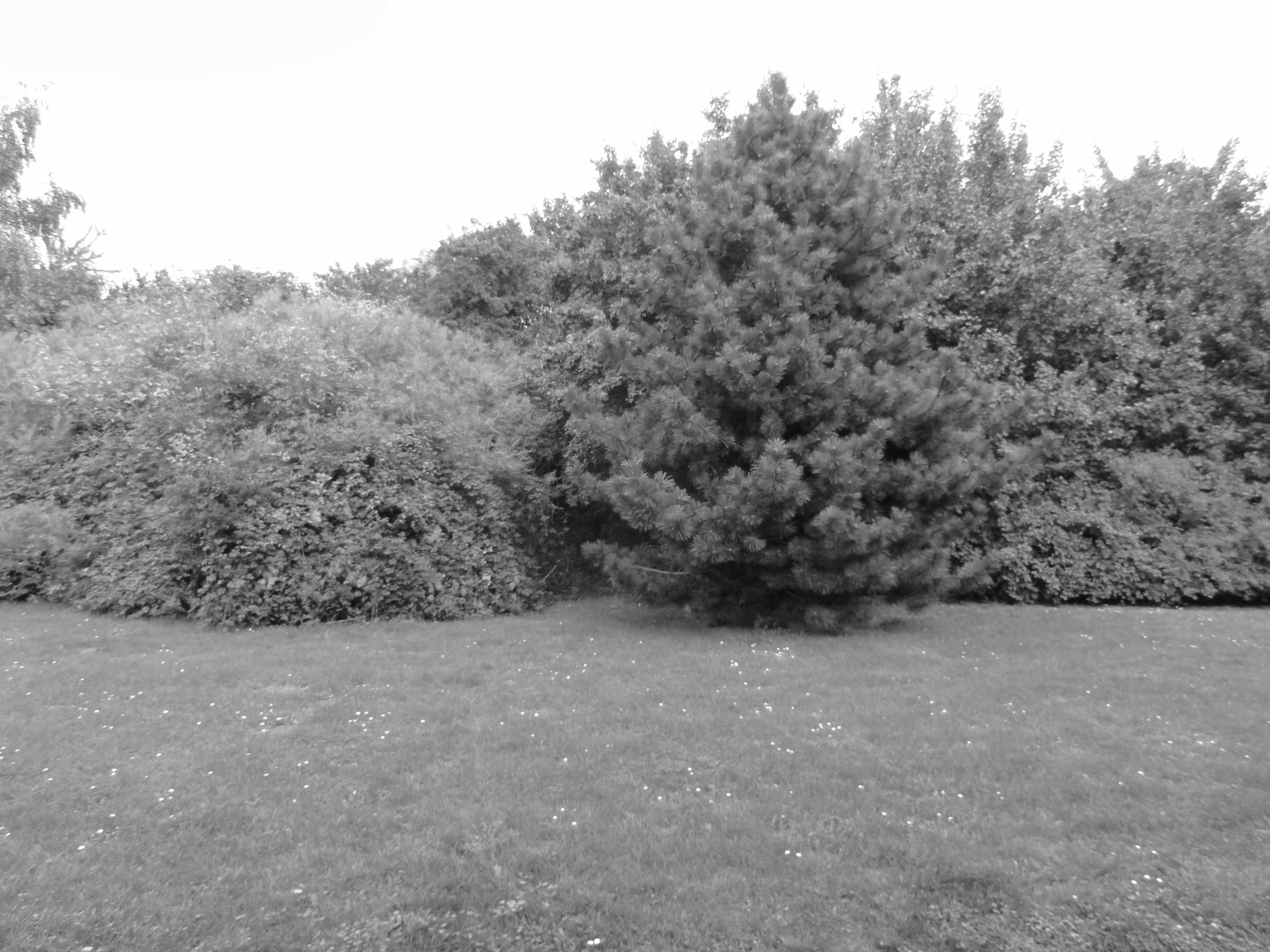 Terril n° 215 dit 4 de Liévin, fosse n° 4 - 4 bis de la Compagnie des mines de Liévin dans le bassin minier du Nord-Pas-de-Calais, Avion, Pas-de-Calais, Nord-Pas-de-Calais, France.